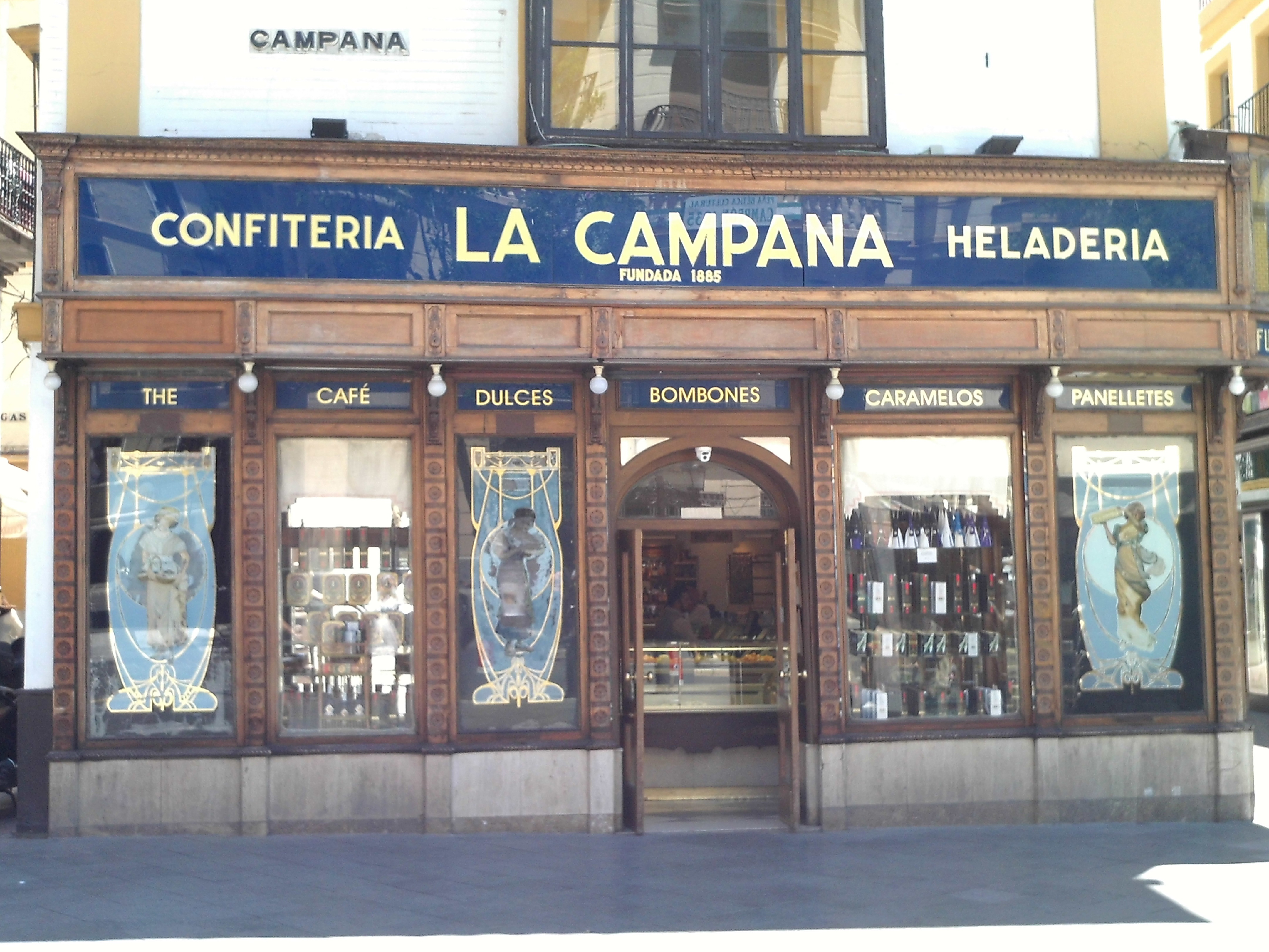 Confitería La Campana. Sevilla, Andalucía, España.